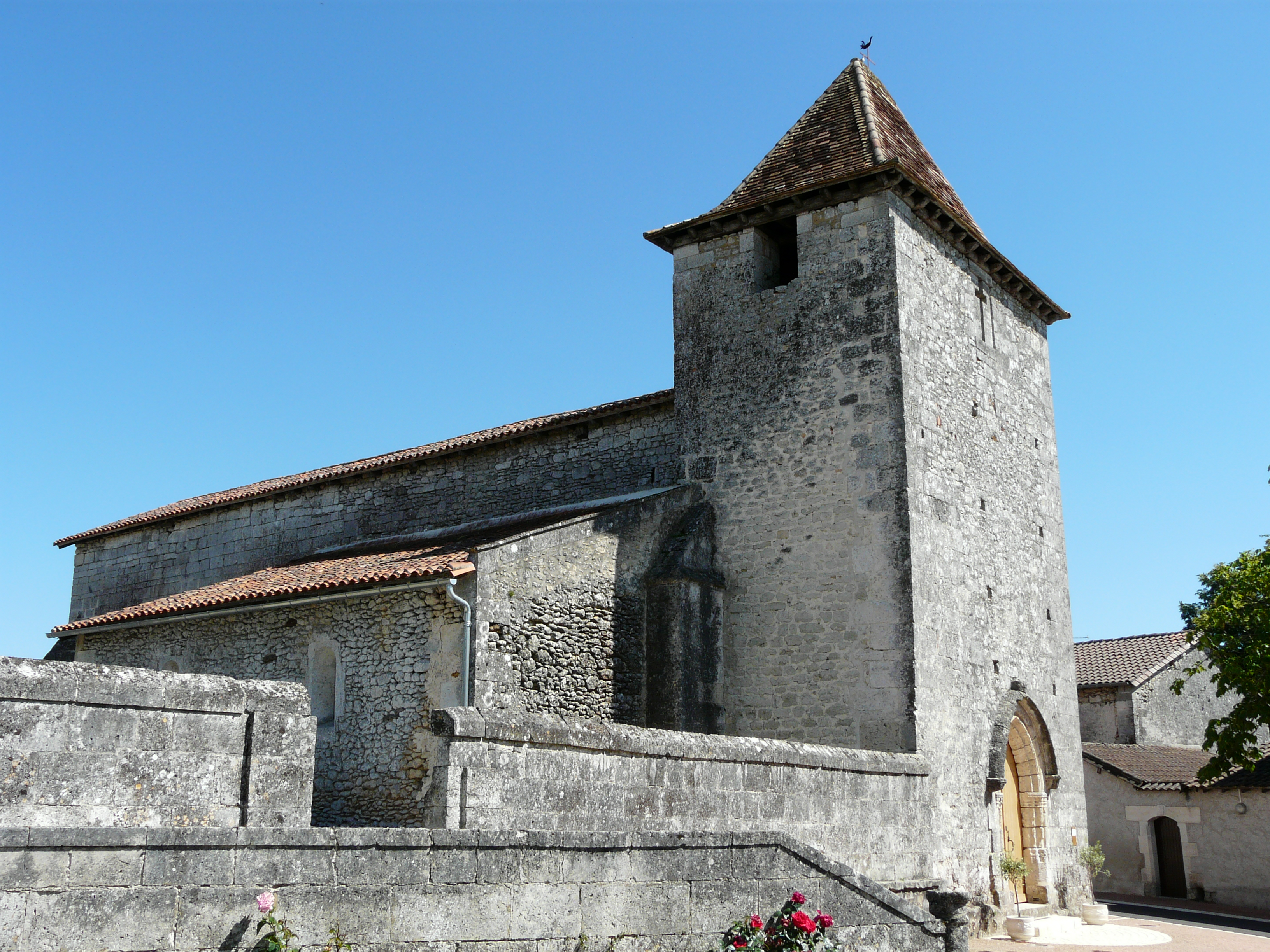 L'église Saint-Barthélemy vue du nord-ouest, La Chapelle-Montabourlet, Dordogne, France.